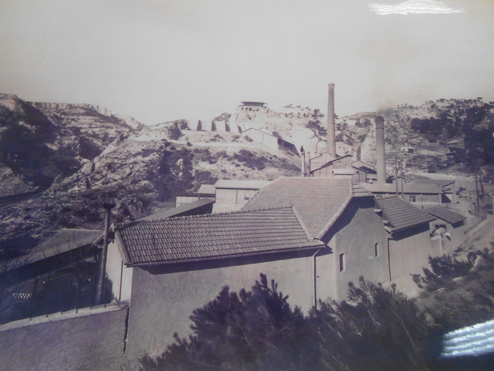 travail d'après photos d'habitants des Riaux